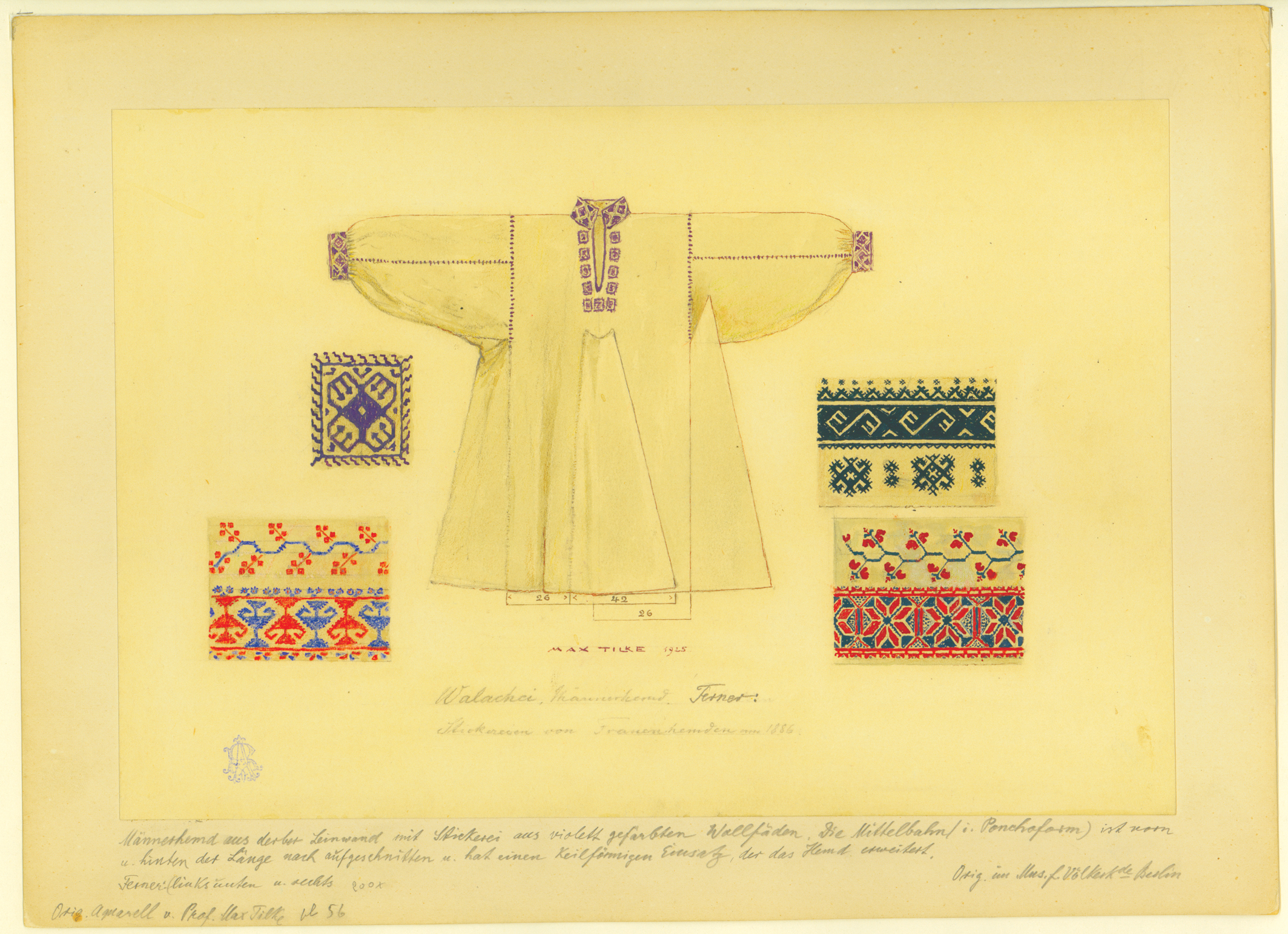 Волоська вишиванка